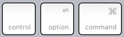 Bild der alt - option Taste auf neuen Mac-Tastaturen